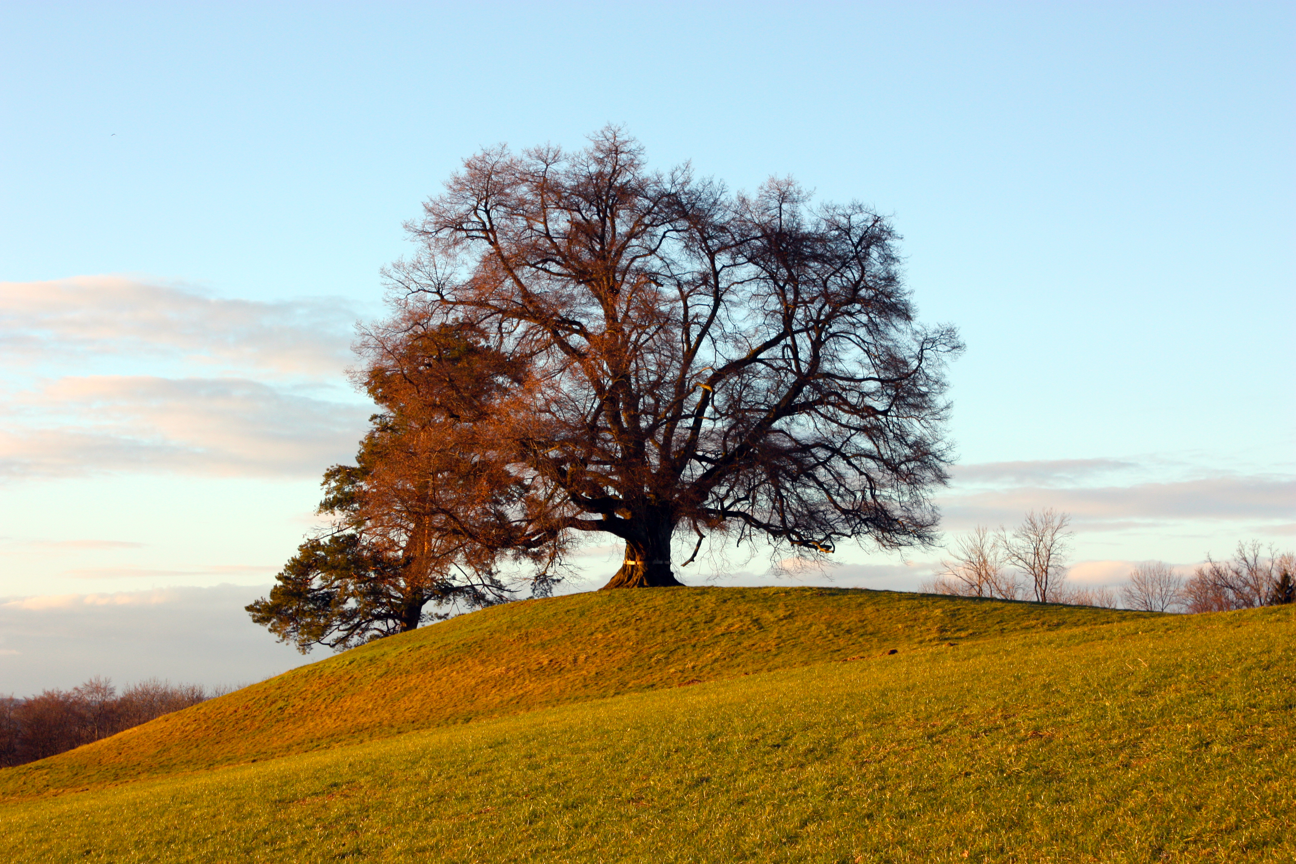 Zundelbacher Linde („Lindele“)